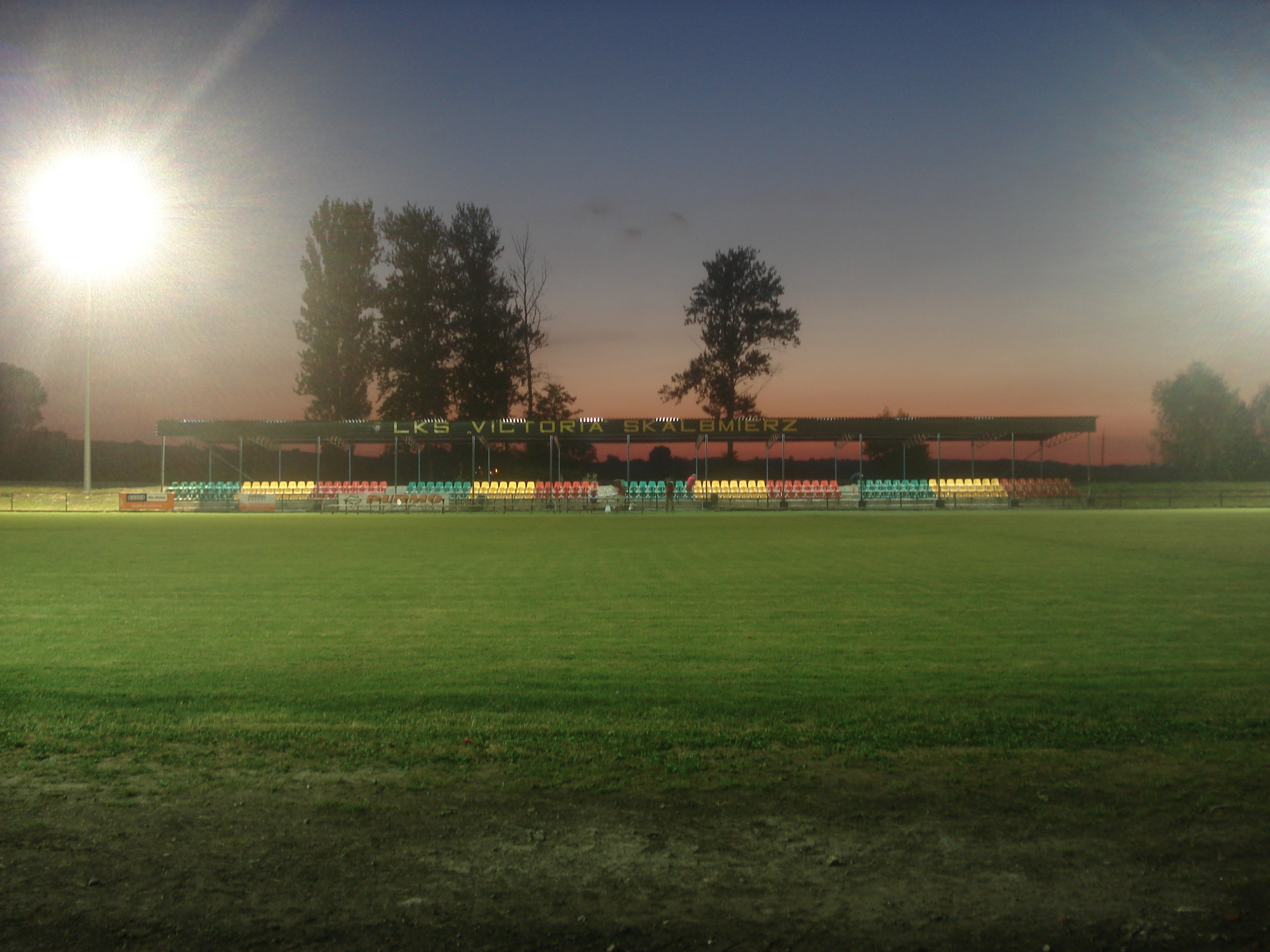 Stadion Victorii,trybuna oraz maszty oświetleniowe noca.